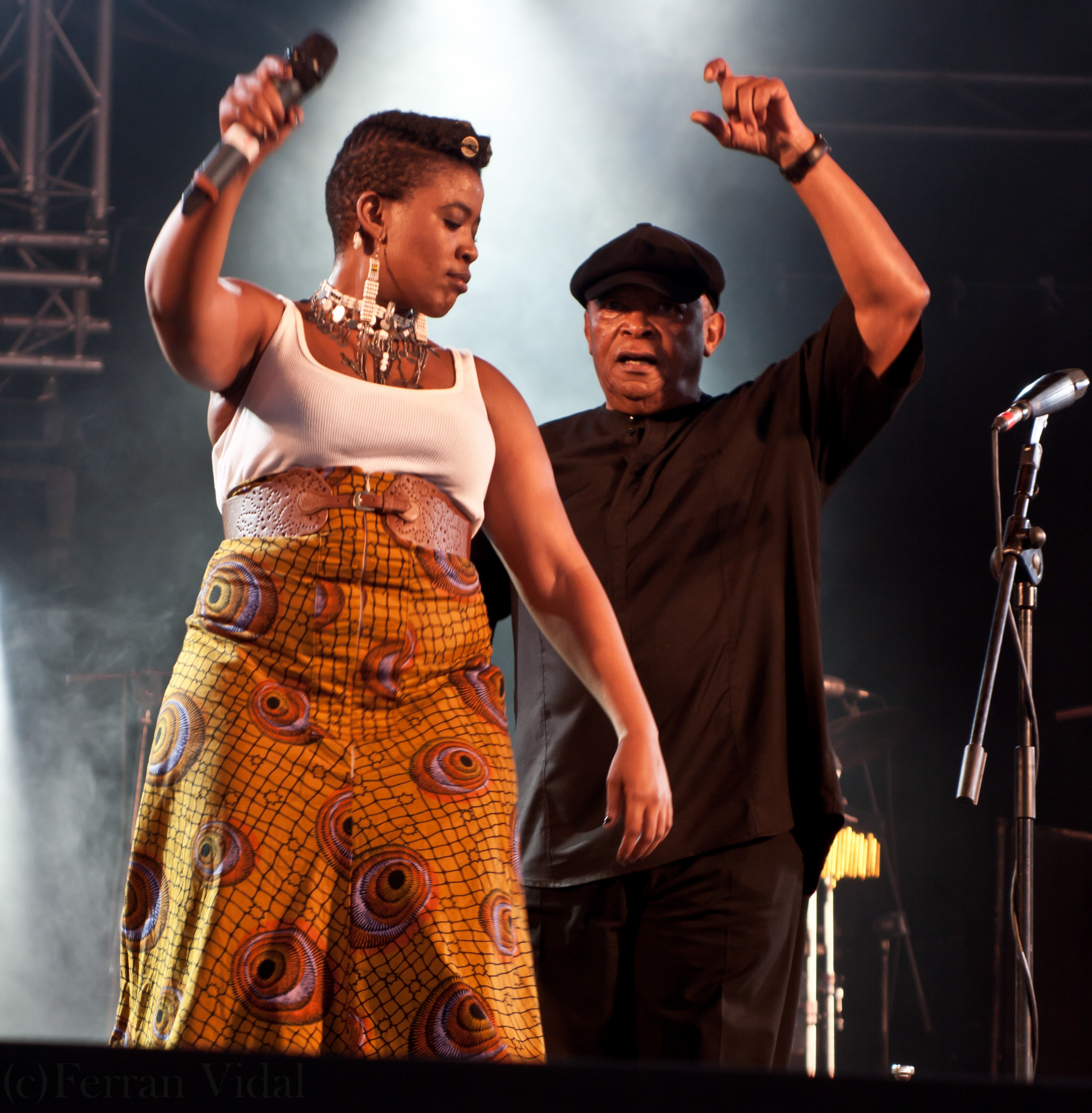 8 de juliol de 2011 Festival Cruïlla Barcelona Parc del Fòrum